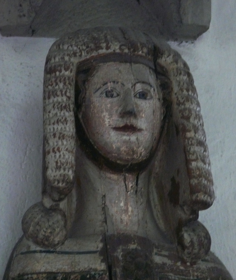 Agnes of Branderburg (1334)